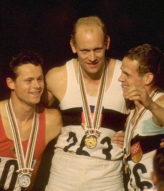 Rein Aun, Willi Holdorf, Hans-Joachim Walde, 1964 Olympics